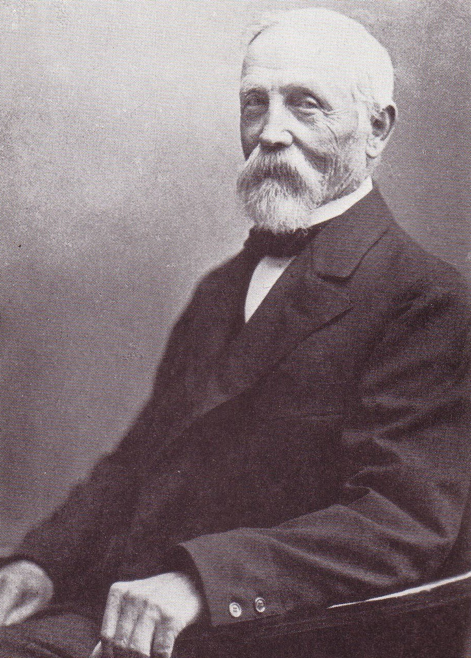 Fotografie von Ludolf von Bismarck